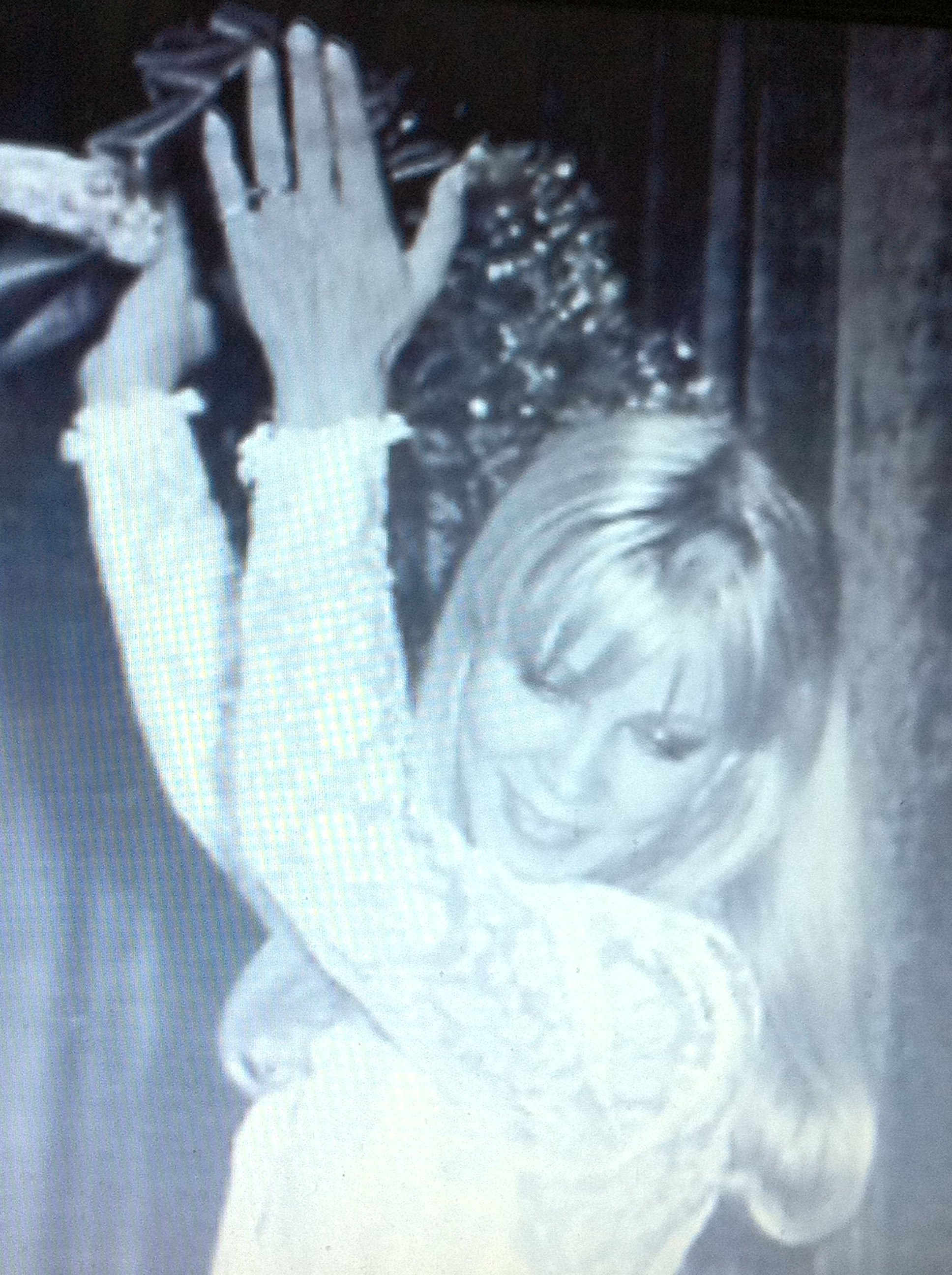 Boston